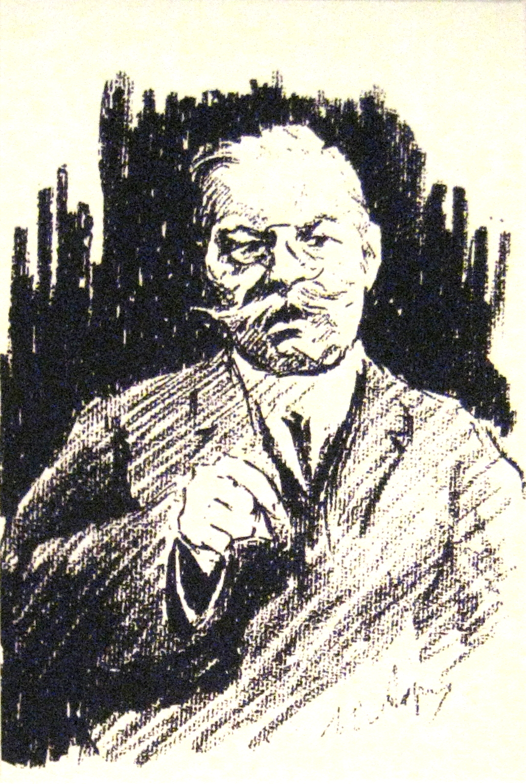 Ю.К. Арцыбушев. Портреты политических деятелей. Москва, 14 августа 1917. ГИМ. Зарисовки с натуры, выполненные во время Государственного совещания в Москве, были опубликованы в издательстве Д.Я. Маковского